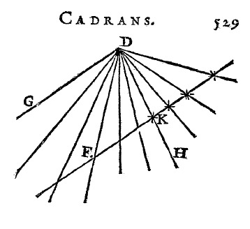 Une illustration de Pratique des grands cadrans : construction de lignes horaires.